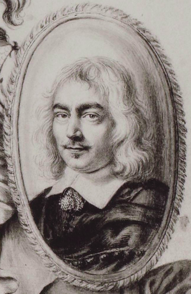 La Rhétorique des Dieux